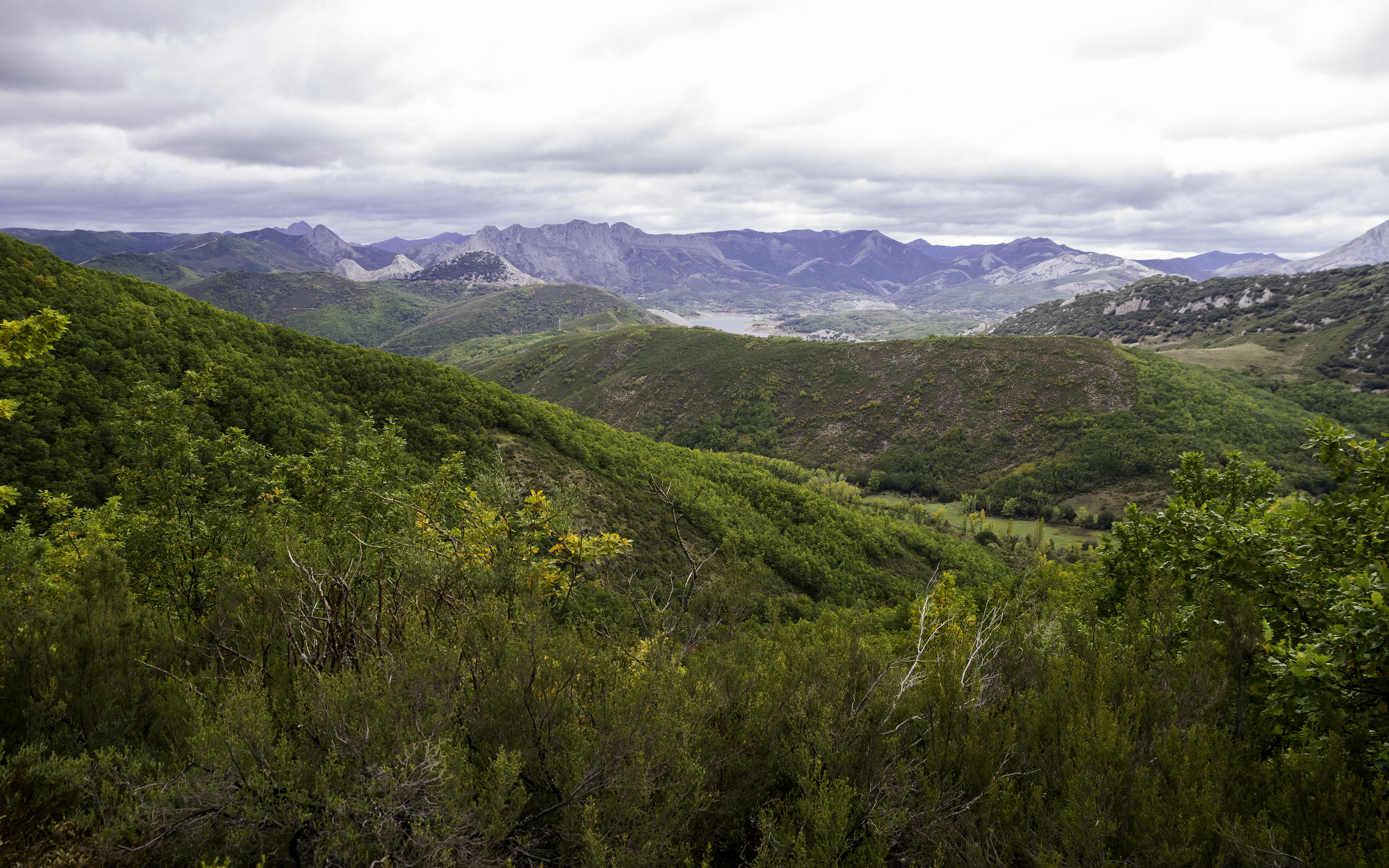 Picos de Europa. Vista de las montañas que rodean al valle en el que se embalsa el agua del Pantano del Porma, desde el bosque de Pardomino, en otoño. Boñar. León. España This is a photography of a Special Area of Conservation in Spain with the ID: ES0000003. Natura2000 entry, EEA entry